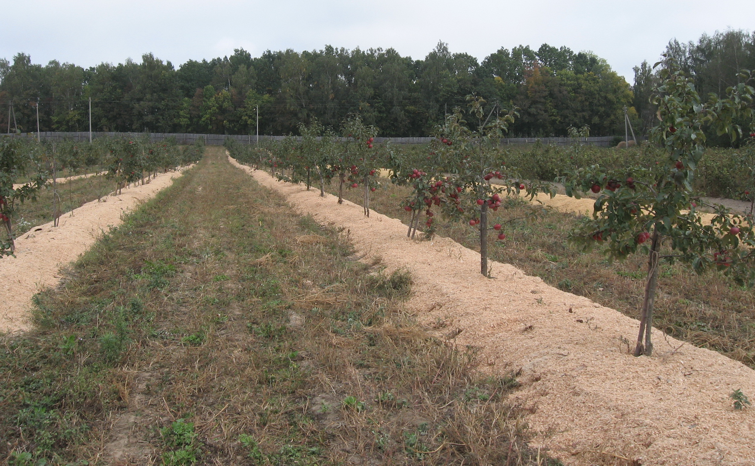 Мульчирование приствольных полос плодовых деревьев